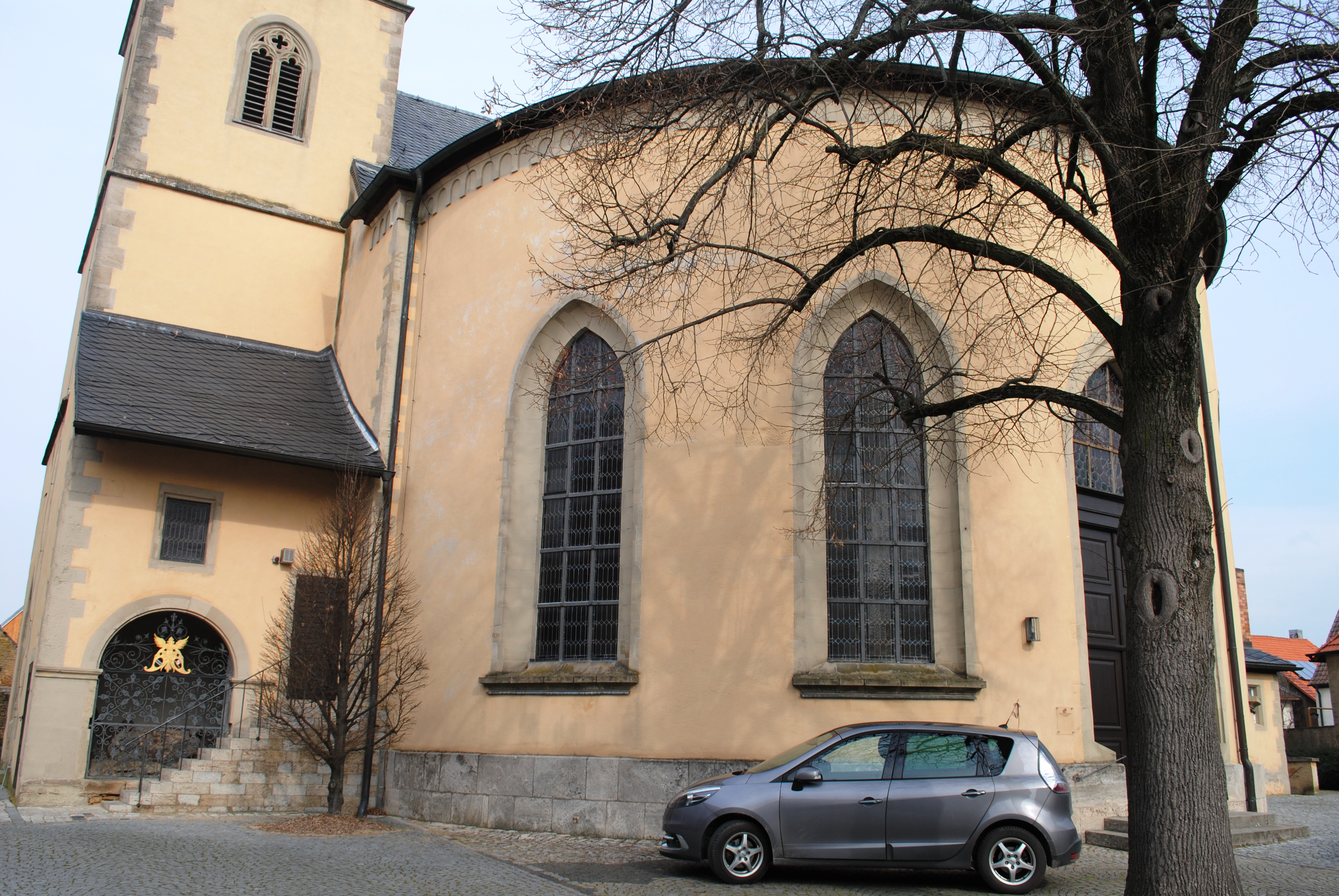 Rotunde, Süden, Jakobskirche, Großlangheim